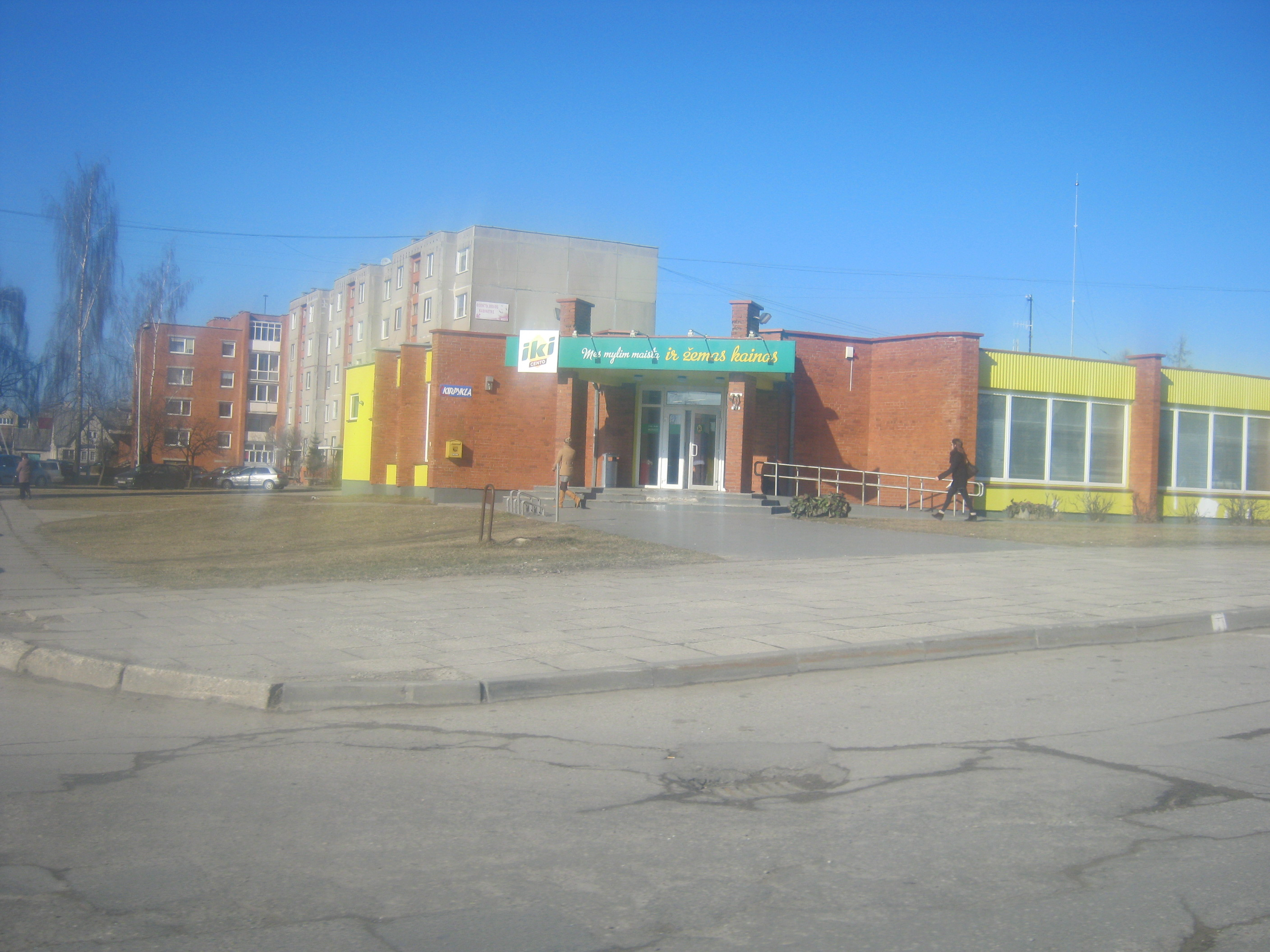 Jonava